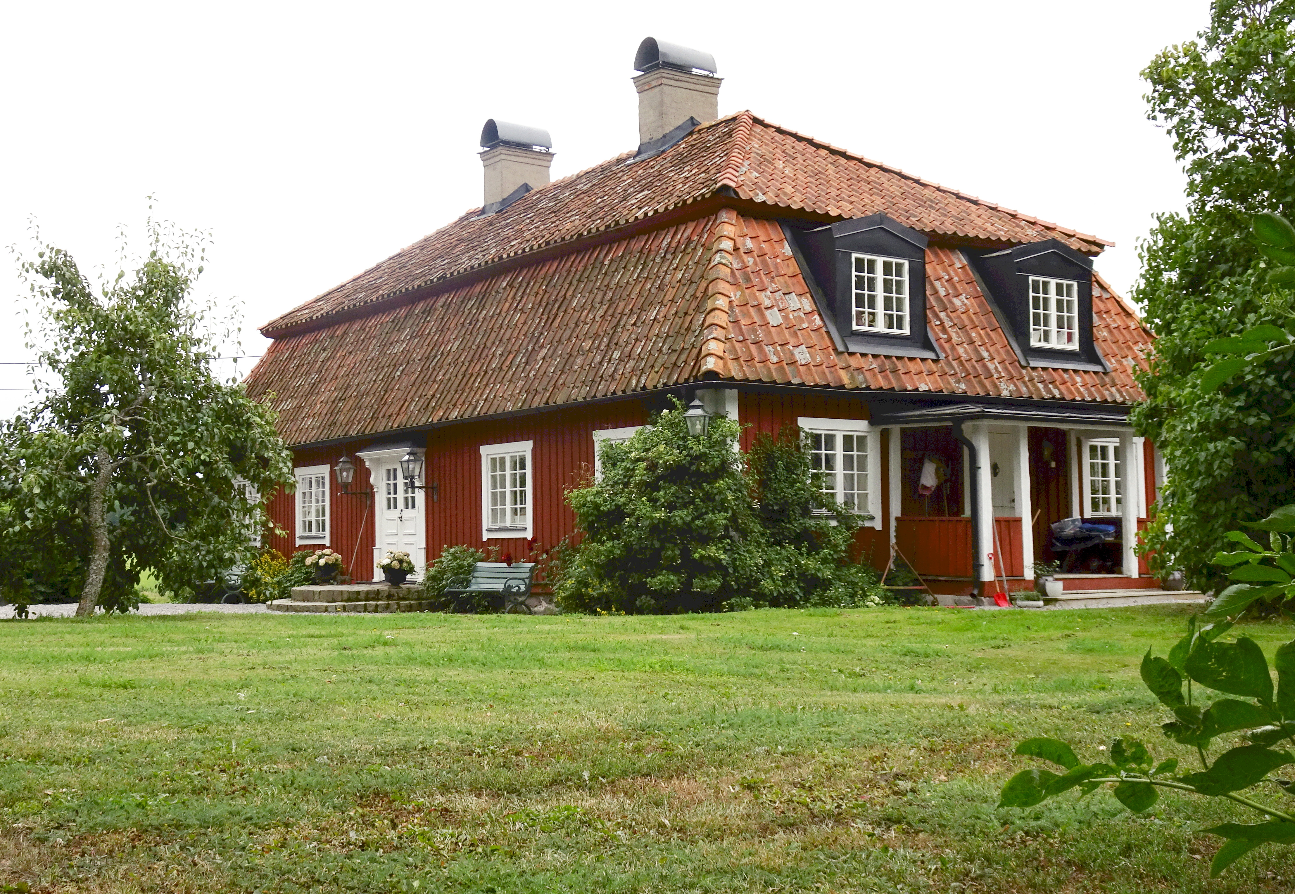 Frösviks 1700-tals flygel